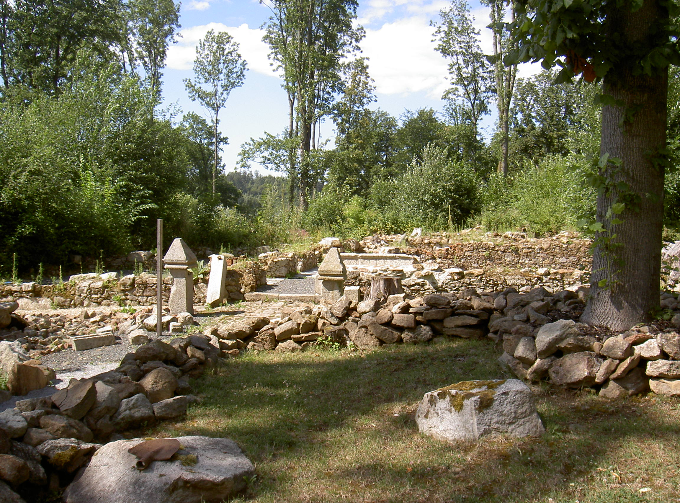 Grafenried (Lučina)